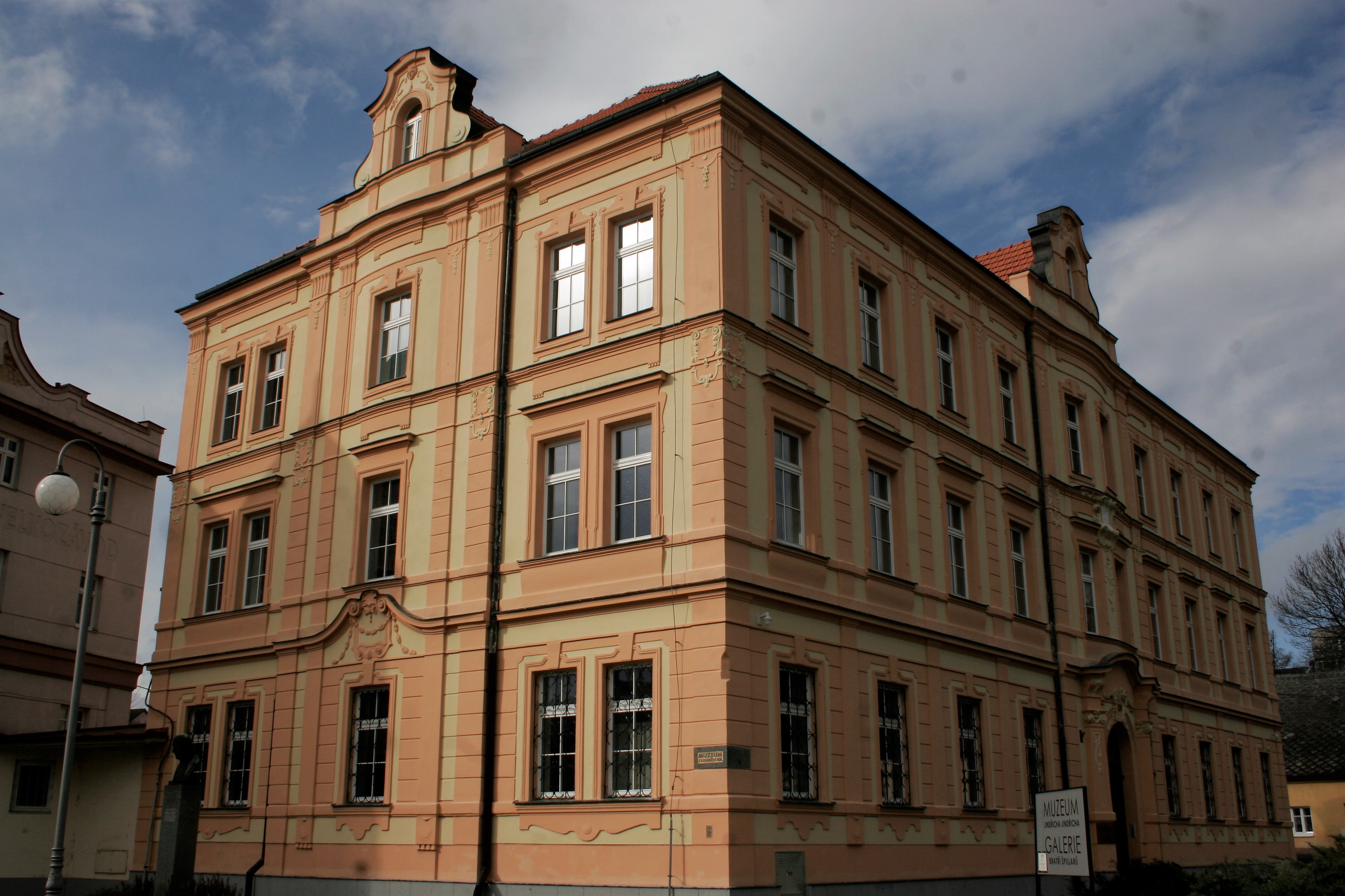 Muzeum Jindřicha Jindřicha a Galerie bratří Špillarů v Domažlicích.